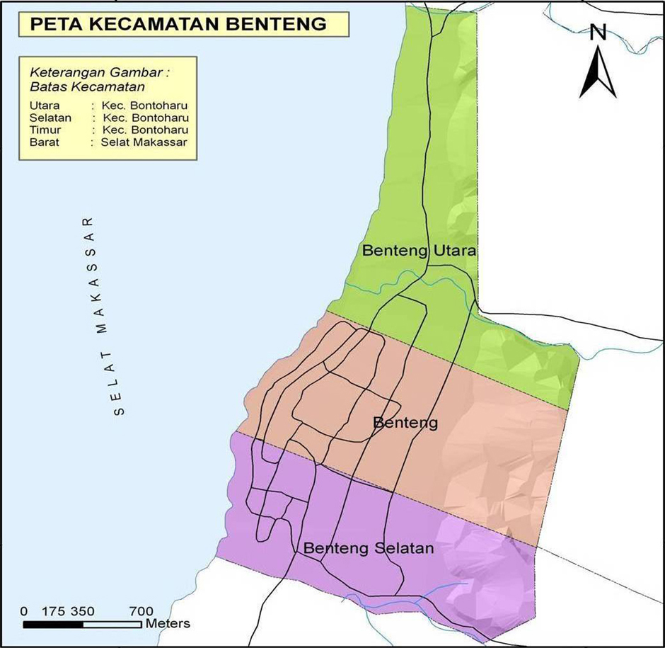 berkas ini juga dipakai pada beberapa proyek wikipedia bahasa indonesia tepatnya di kabupaten Kepulauan Selayar, Sulawesi Selatan, Indonesia